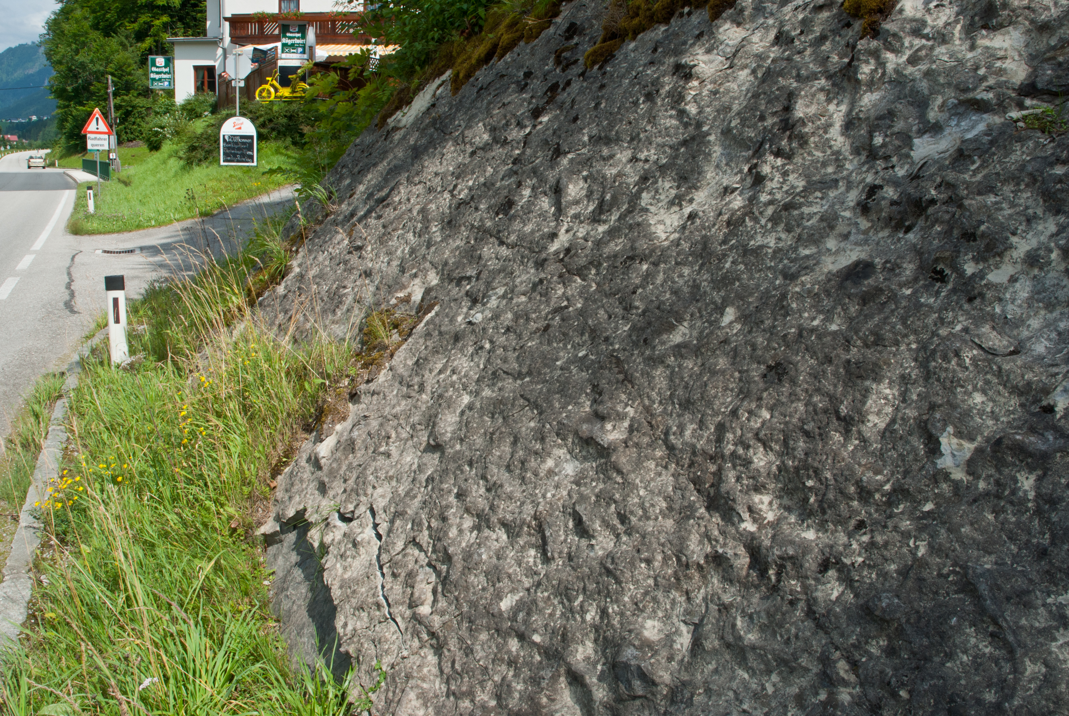 Reiflinger Kalke mit knollig-welliger Oberfläche an der B25 östlich von Göstling